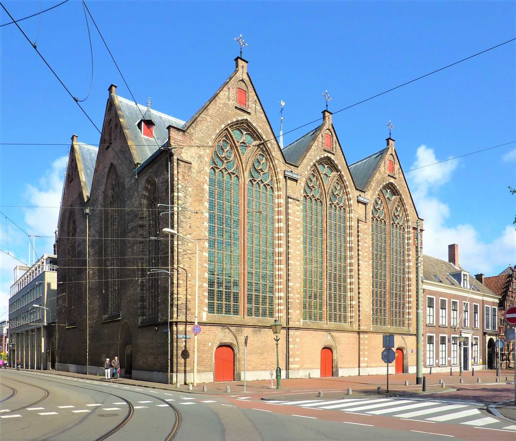 Kloosterkerk (The Hague)